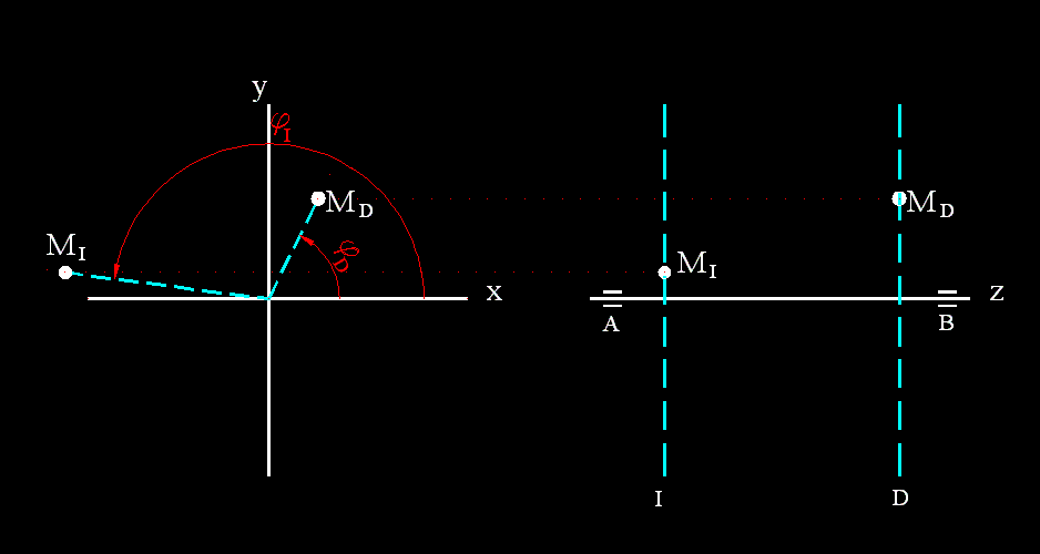 Método de las tres carreras para equilibrar ejes